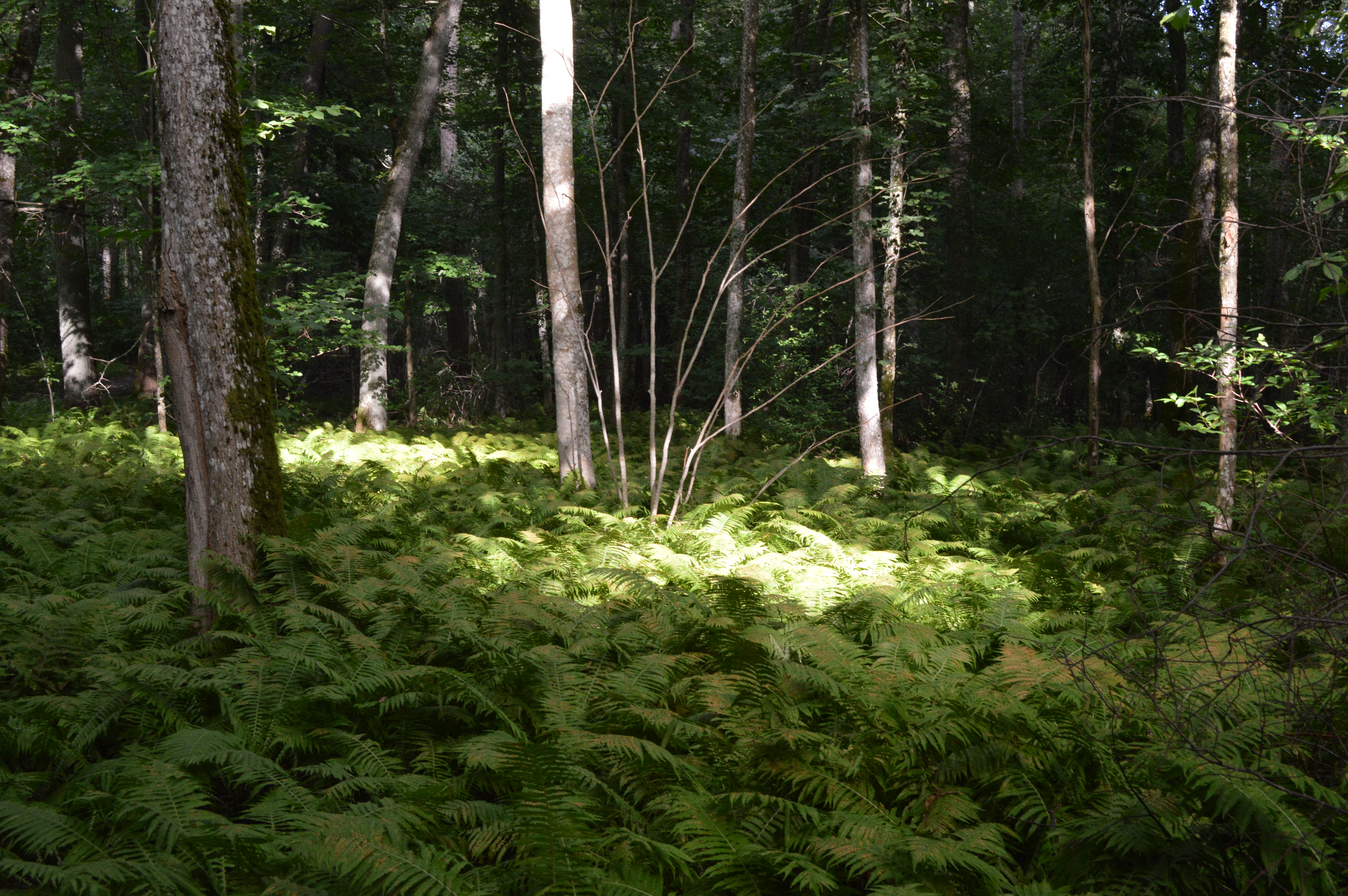 Kotkansiipisaniaisia Ramsholmenissa